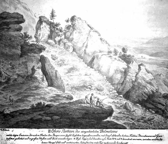 Obere Partien des eingestürzten Dolensteins (heute Dohlenstein) Handzeichnung von Melchior Kraus, 1780